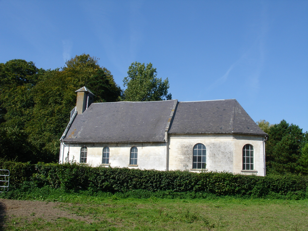 Église Saint-Martin de Blingel